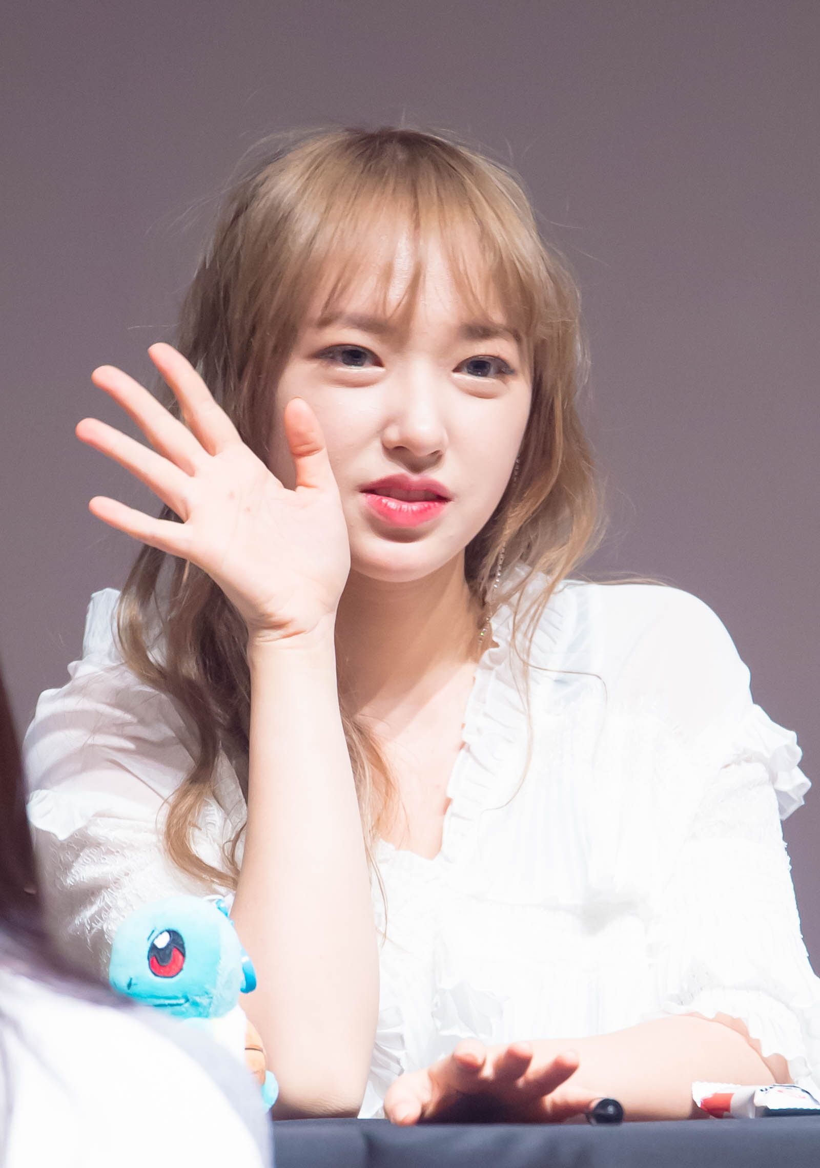 170107 명동팬싸인회 우주소녀 직찍